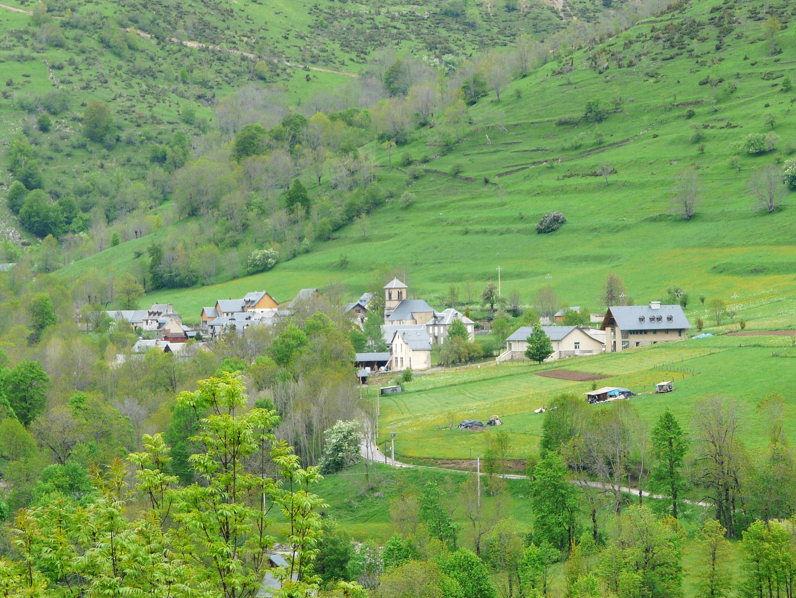 Le village de Jurvielle, Haute-Garonne, France. Vue prise depuis la route départementale 618.